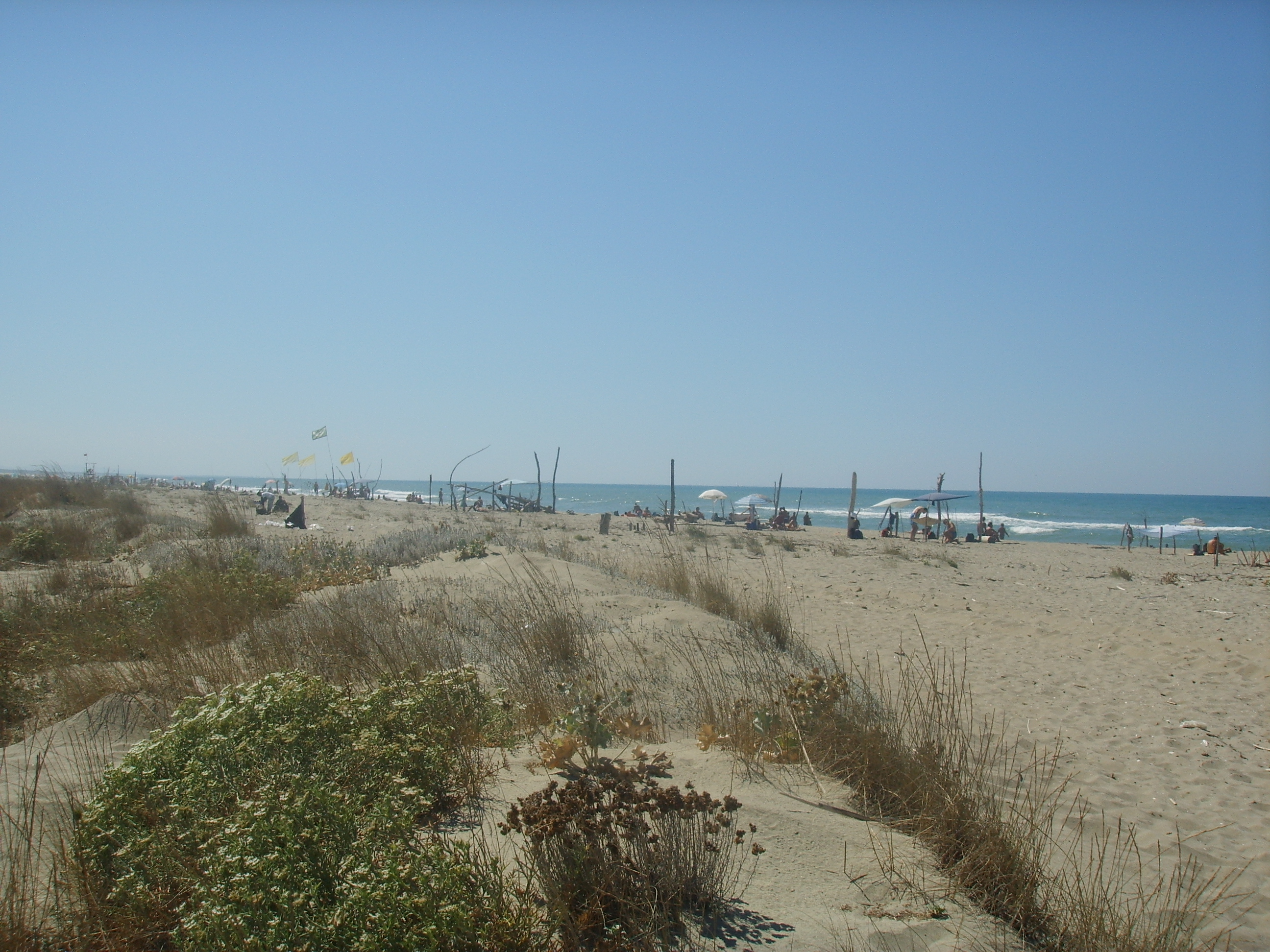 Viareggio, torre_del_lago,_spiagga_lecciona. in Viareggio, italy